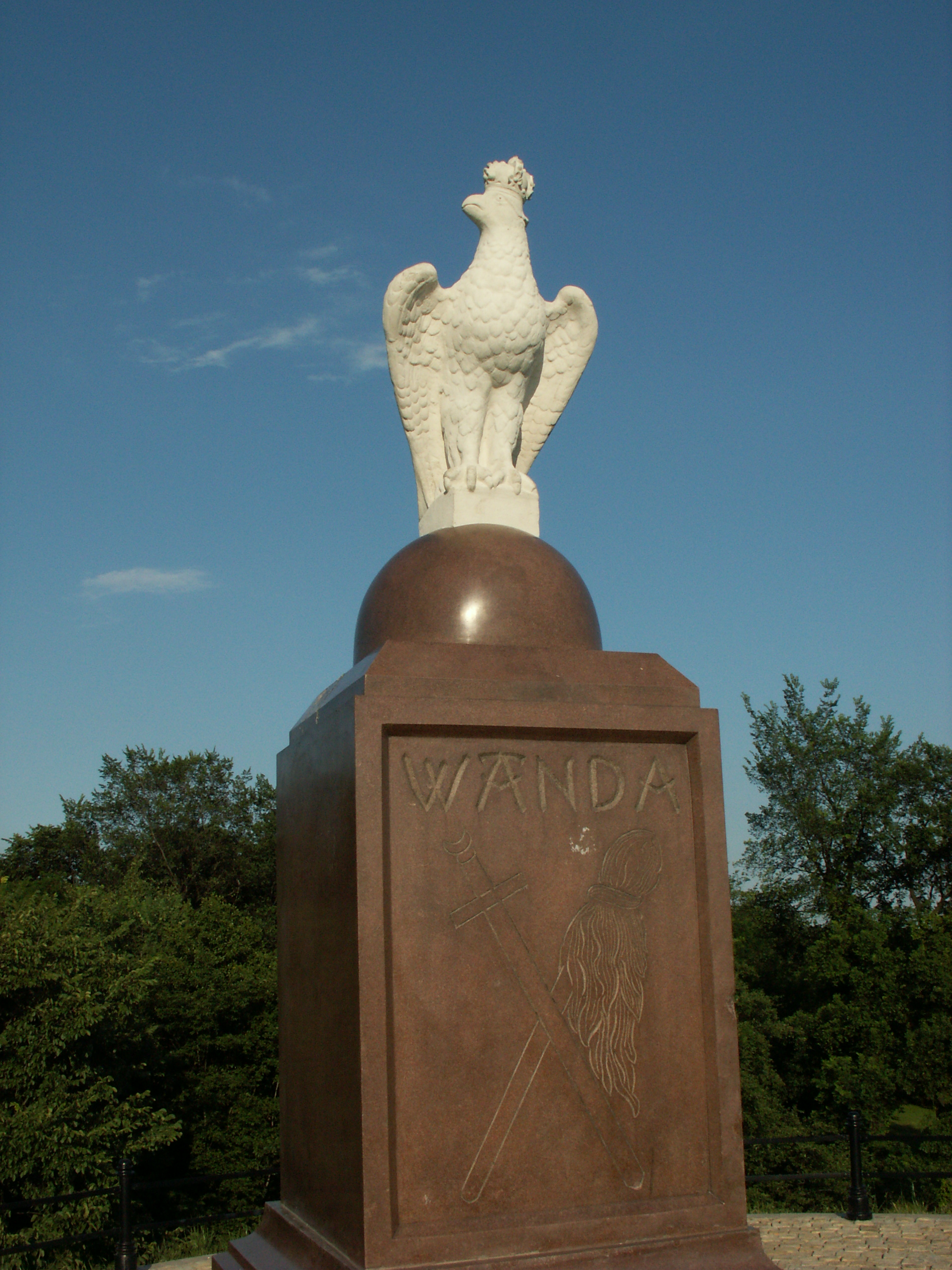 Kopiec Wandy; autor: macieias